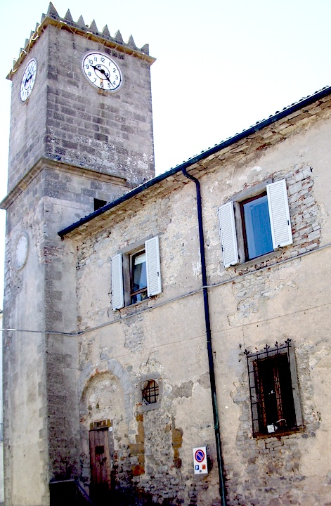 La Torre dell'Orologio della Rocca aldobrandesca di Castell'Azzara (GR), Tuscany (Italy)